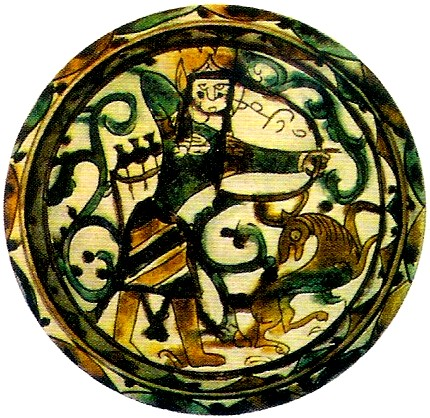 Beyləqanda arxeoloji qazıntılar zamanı aşkarlanmış bədii nimçə (Azərbaycan Tarix Muzeyi).